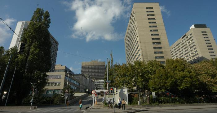 Eingang zum Allgemeinen Krankenhaus Wien in der Lazarettgasse (Wien-Alsergrund)